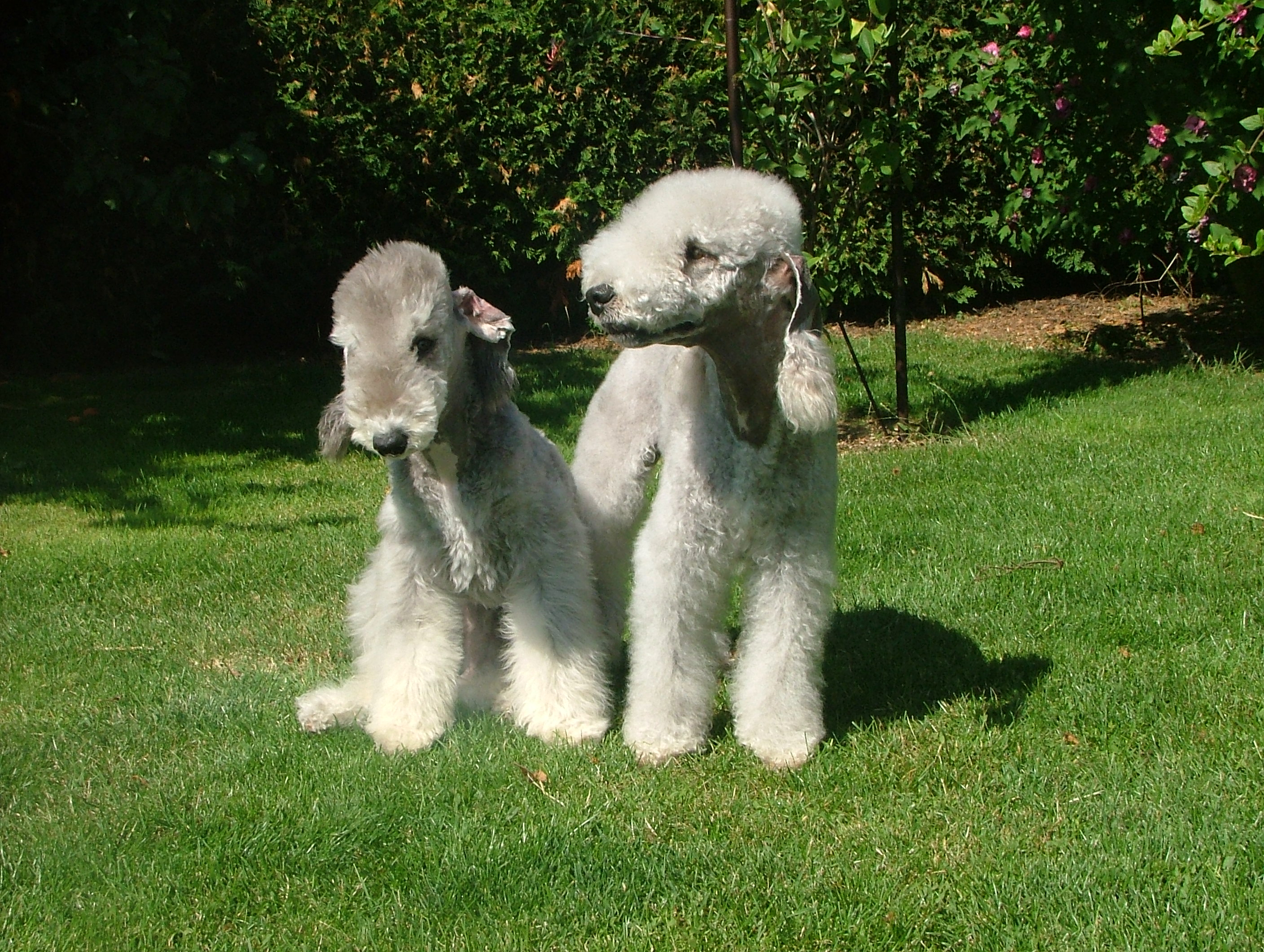 Deux Bedlington Terriers en juillet 2009.